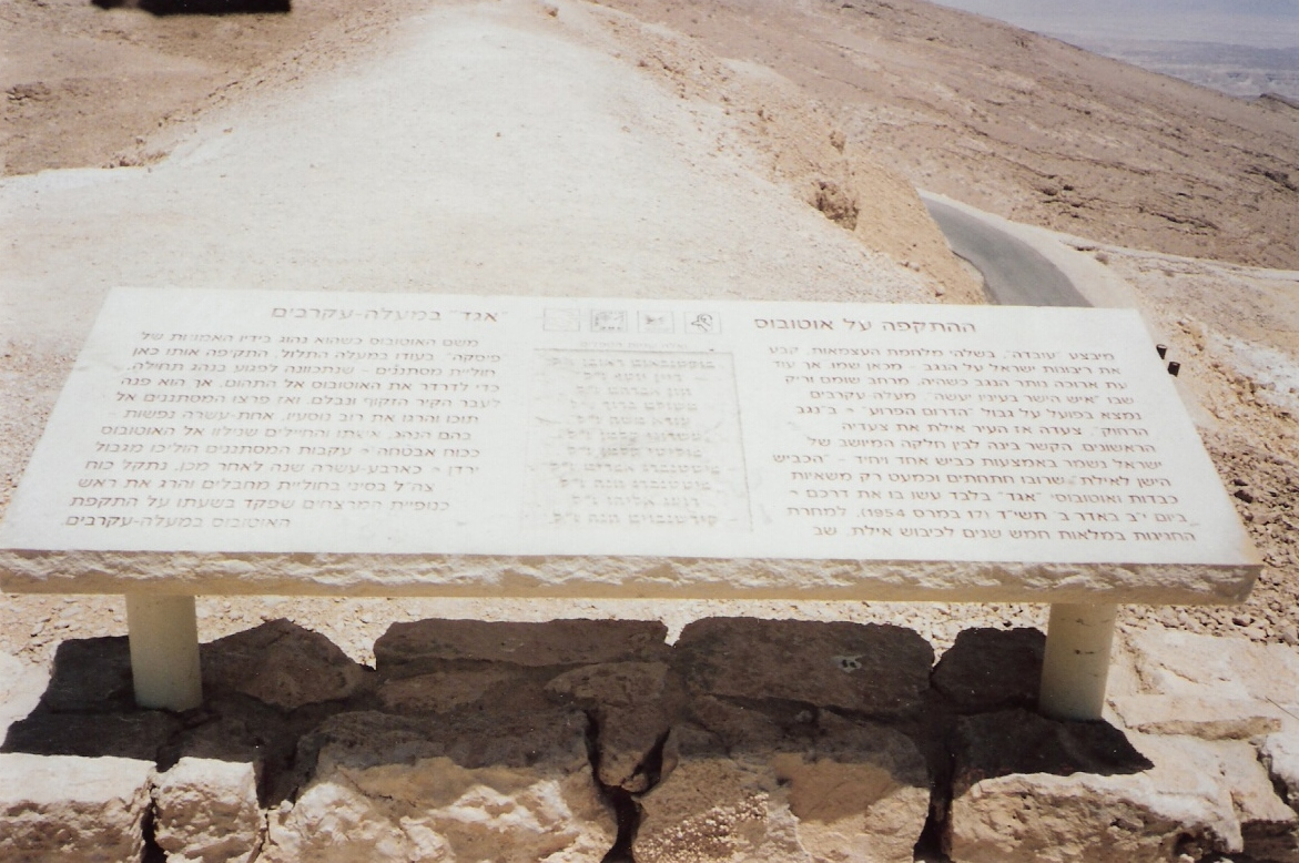 Memorial to Maale Haakrabim massacre, Israel.